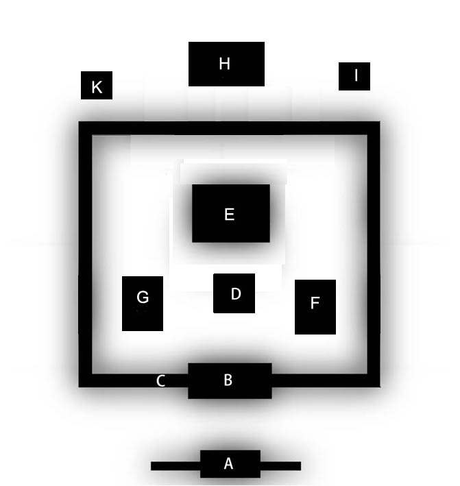 Anlage des Asuka-Tempels (Asukadera) in Asuka, Japan. A: Südtor; B: Mittleres Tor; C: Rundgang; D: Pagode; E: Nördliche Gold-Halle; F: Östliche Gold-Halle; G: Westliche Gold-Halle; H: Lehrhalle; I: Sutrenspeicher; K: Glockenturm